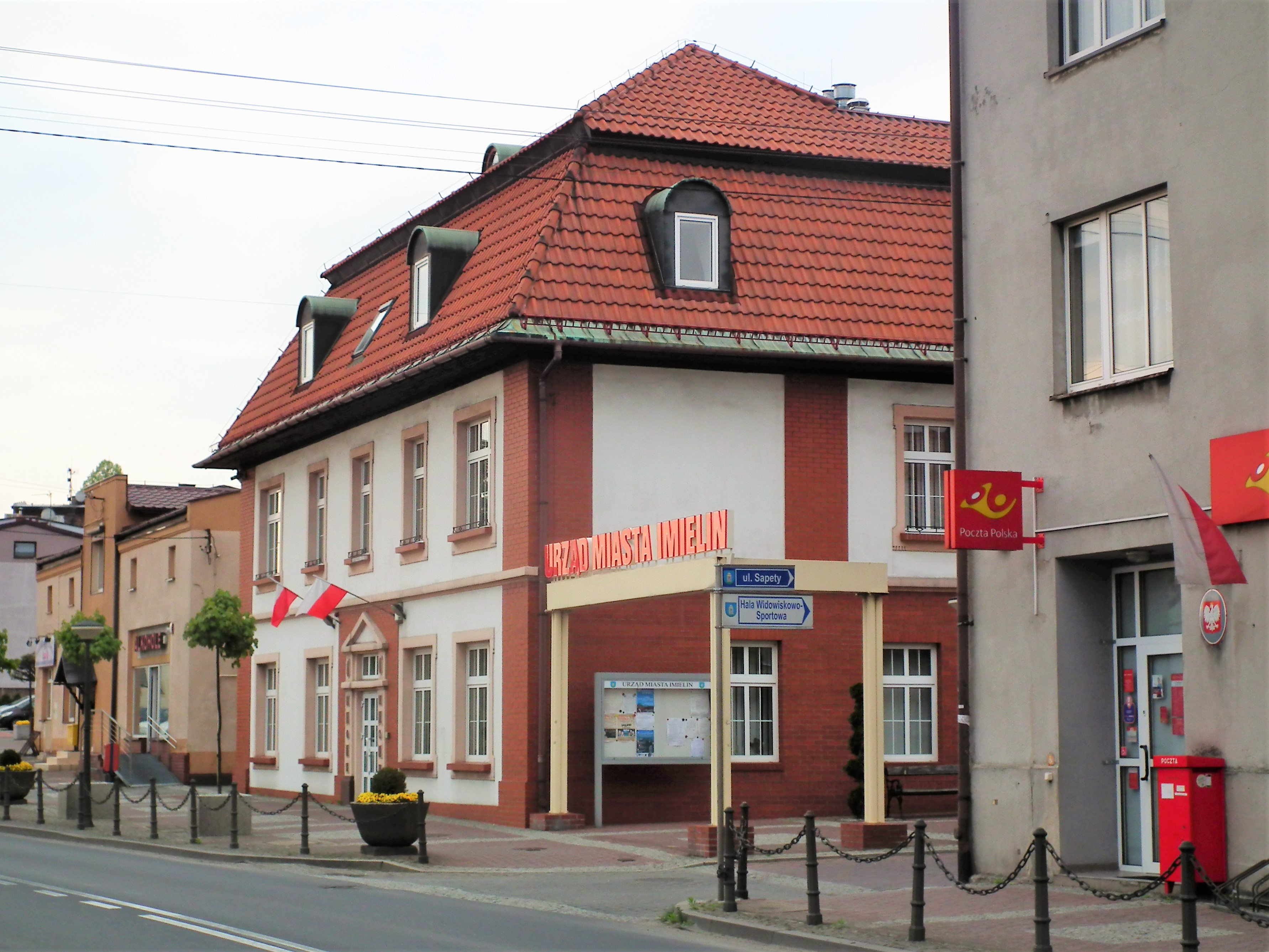 Imielin. Centrum. Urząd Miejski i poczta.